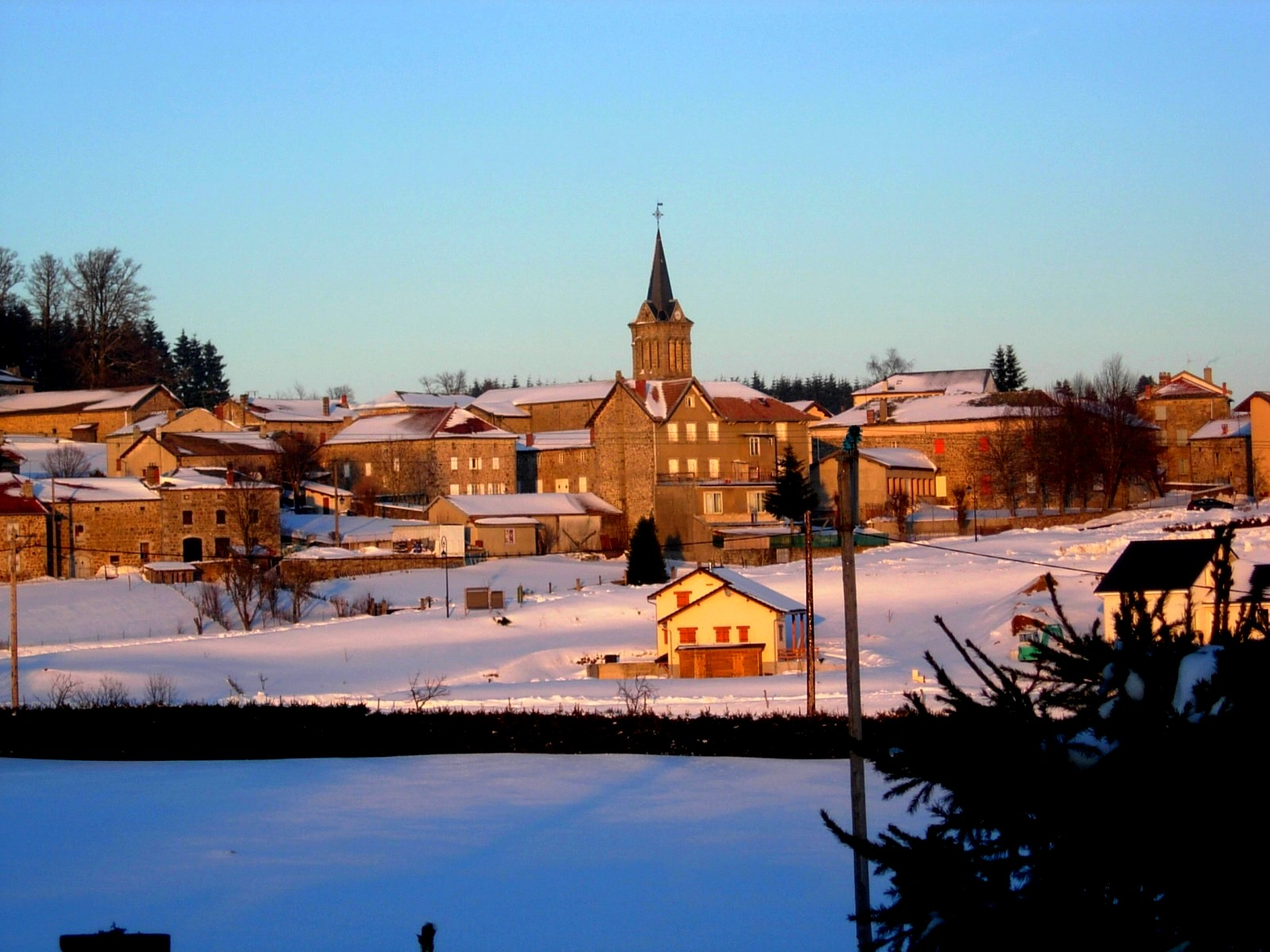 Vue du village en hiver